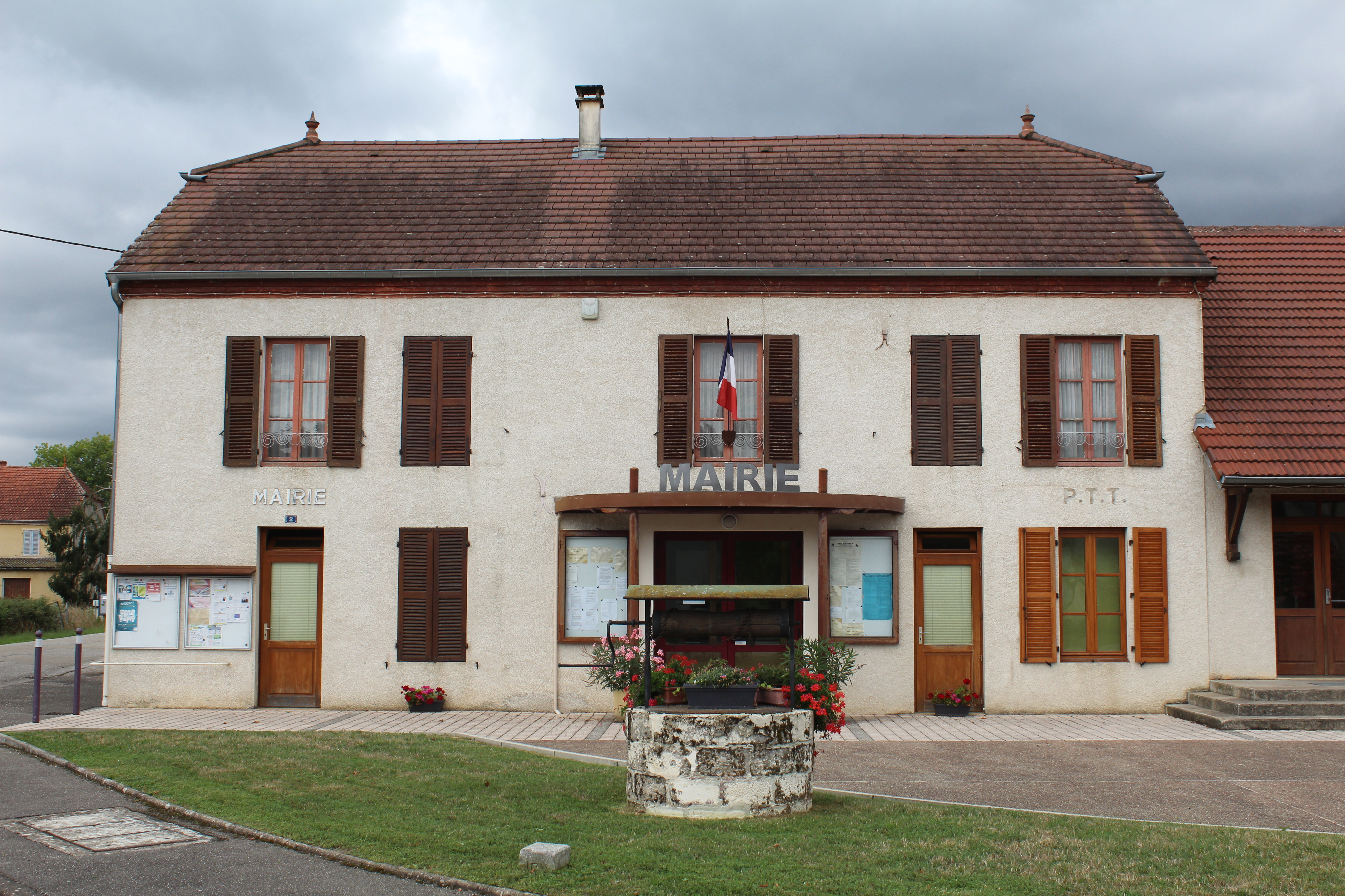 Mairie des Hays.